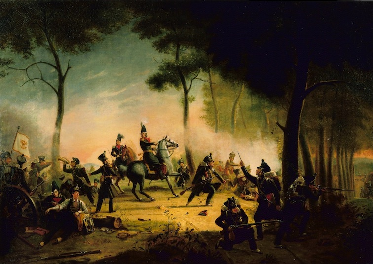 De Vrijwillige Jagers der Leijdsche Hoogeschool, in het Avond gevecht te Bautersem, op 11 Augustus 1831, door Jacobus Schoemaker Doyer (1792-1867). In 't midden Lt. Generaal Adriaan Frans Meijer te paard; links van hem, iets meer naar voren, de 1ste Luitenant Diederik Jacobus den Beer Poortugael en nog meer links naar voren Dr. Cornelis Wilhelmus van Lede, de arm verbindende van een gekwetste student (Conradus Leemans). Rechts op ongeveer gelijke hoogte met de luitenant-generaal Meijer de 1ste Luitenant Frederik Willem Cornelis Dyserinck Dekker, die de hem omgevende tirailleurs aanvurende. Links o.a. een man met een vaandel, waarin een gekroonde hoorn.